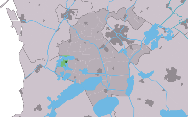 Kaartsje fan himrik fan Sânfurd